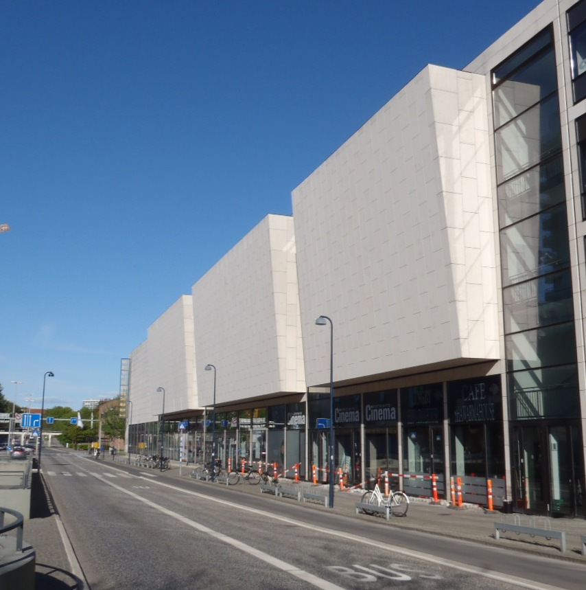 Lyngby Kulturhus ved Klampenborgvej.